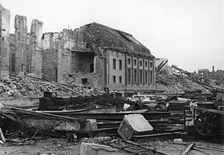 Berlin, Reichskanzlei, Ruine Illus Schmidtke 30.9.50 Baustelle ehemalige Reichskanzlei in Berlin. UBz: Auf dem Gelände der ehemaligen Reichskanzlei schreiten die Enttrümmerungsarbeiten immer weiter fort. Schrott wird aussortiert und zusammengetragen.